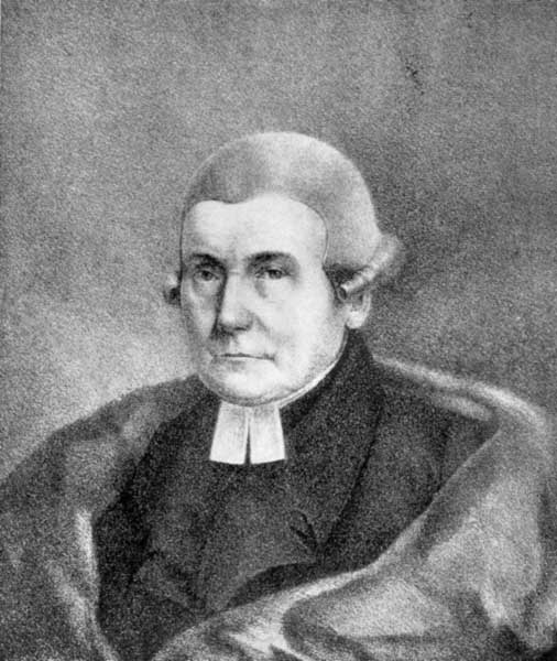 Lithographie Karl Ludwig Nitzsch Theologe, eigenes Archiv, gemeinfrei